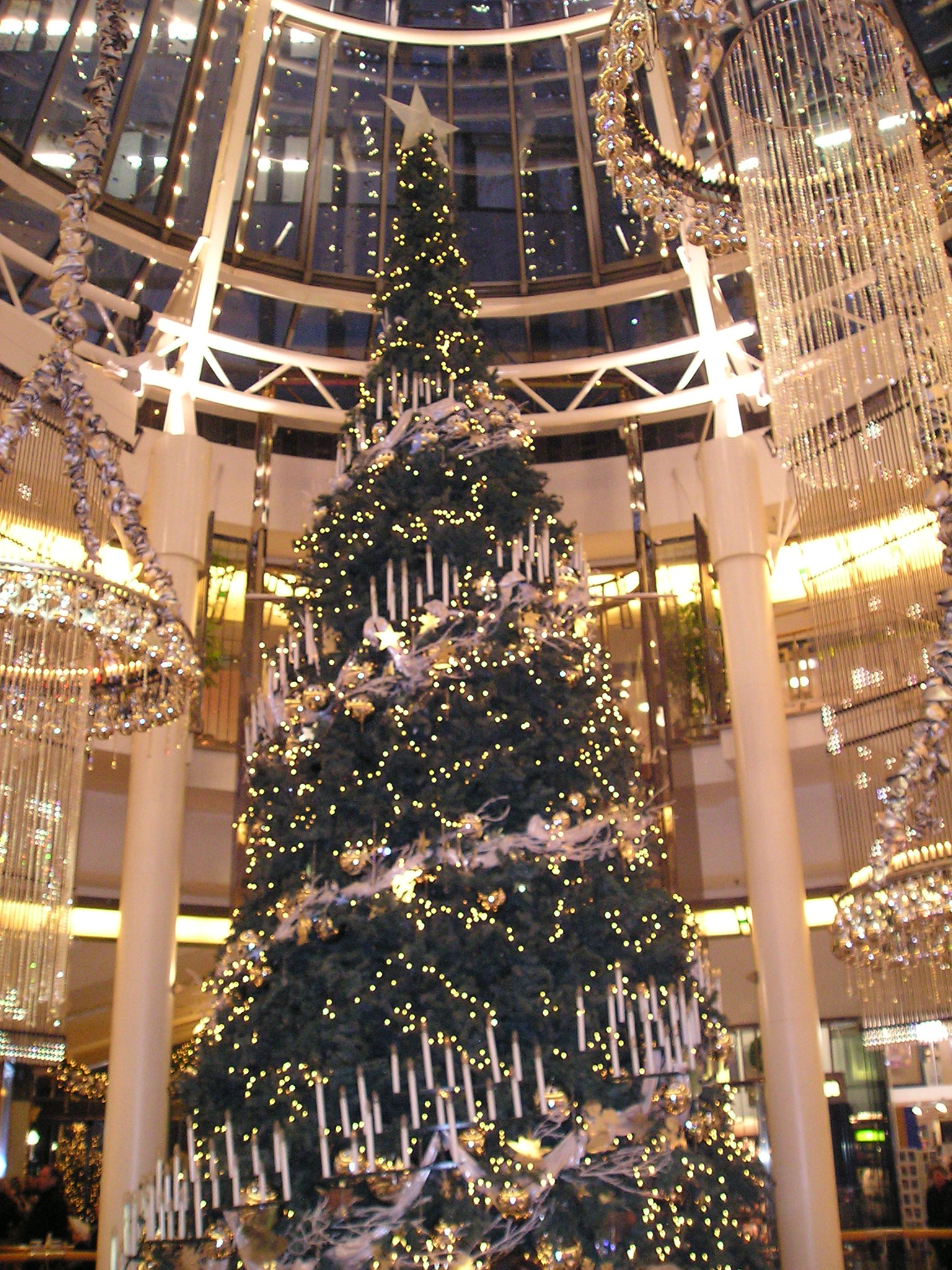 Schadow-Arkaden Düsseldorf, Christmas tree